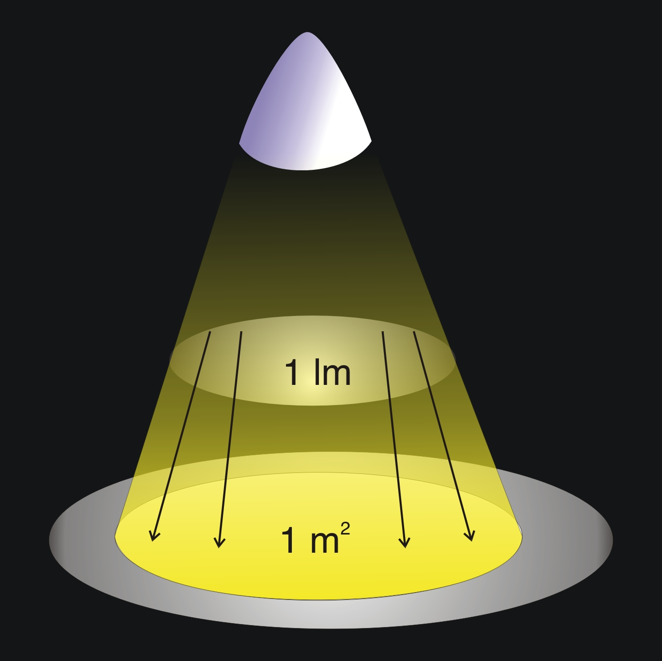 Imagem descritiva de Iluminância